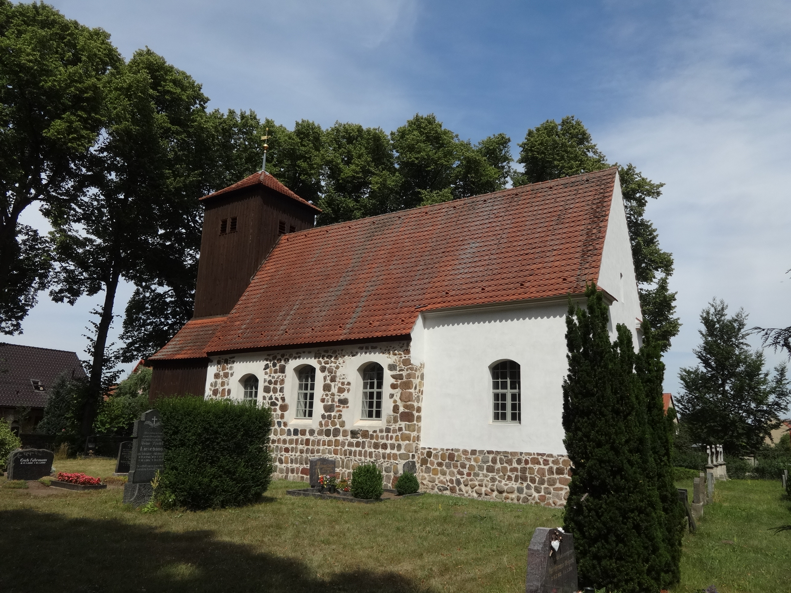 Die Dorfkirche in Schönefeld ist eine Feldsteinkirche aus dem 13. Jahrhundert in Beelitz im Landkreis Potsdam-Mittelmark in Brandenburg. Sie wurde barock überformt und um einen Westturm ergänzt. Im Innern befinden sich ein Kanzelaltar aus dem Jahr 1715 sowie Reste mittelalterlicher Wandmalereien.